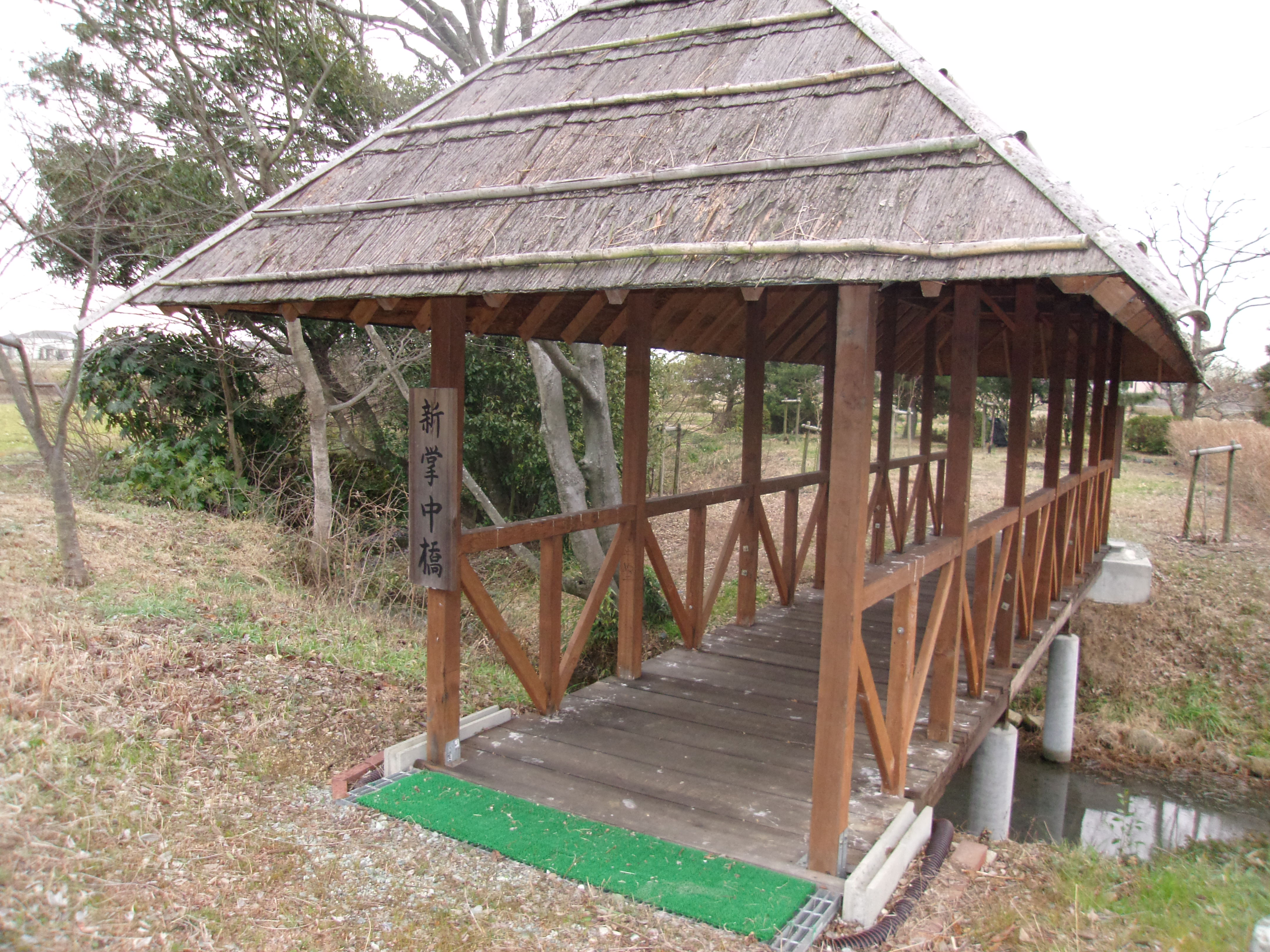 淡河疎水－掌中橋から少し離れた場所に整備された新掌中橋